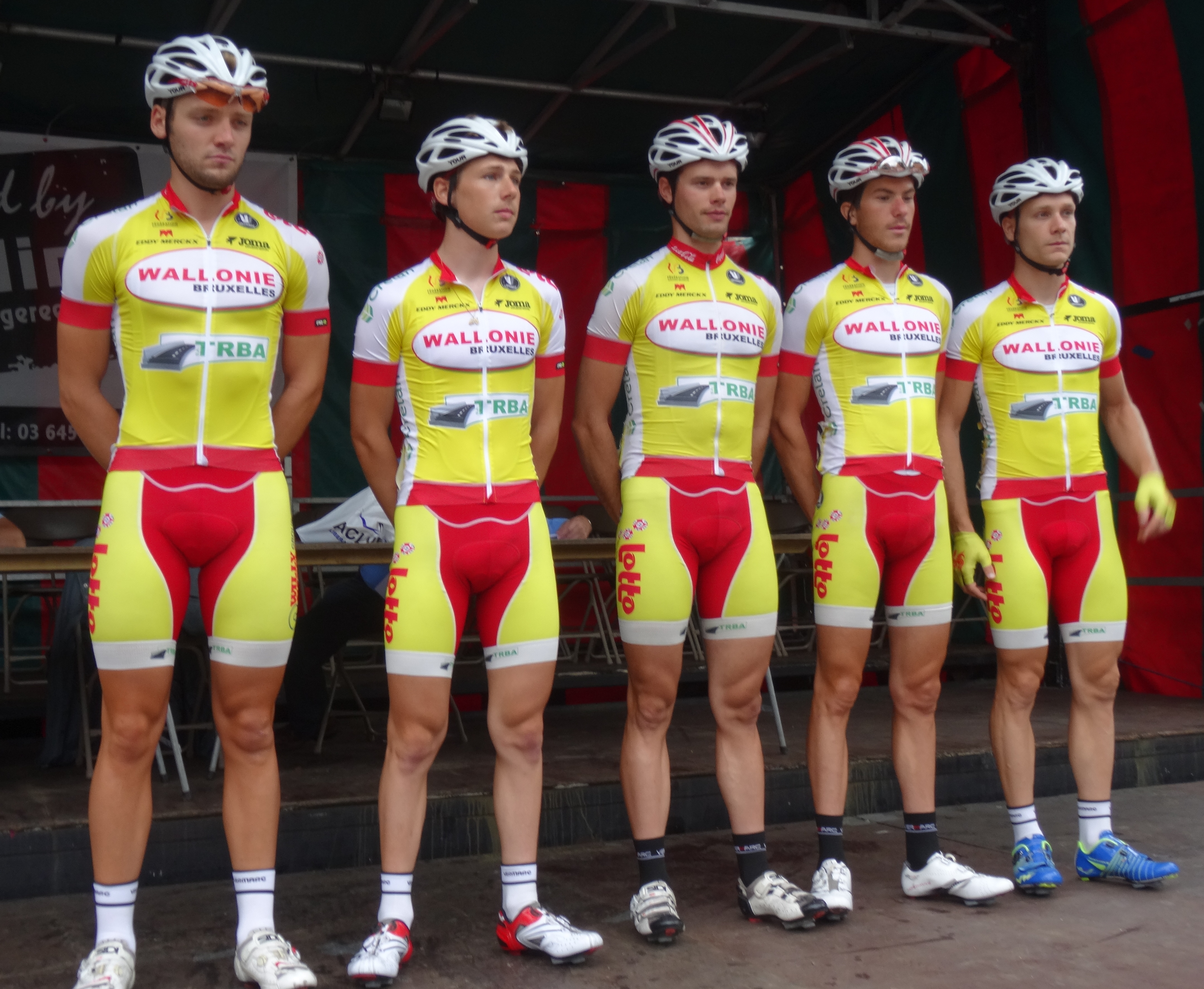 Reportage photographique réalisé le dimanche 10 août à l'occasion du départ et de l'arrivée de la Flèche du port d'Anvers 2014 à Merksem (Anvers), Belgique.